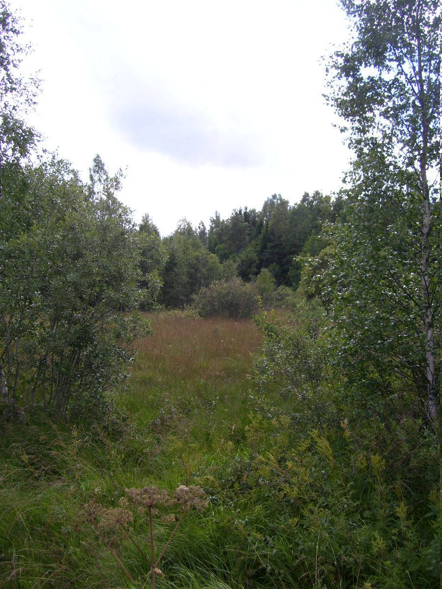 Kukka soo Palade-Kõlunõmme tee ääres, Kõlunõmme küla Juuriku talu lähistel